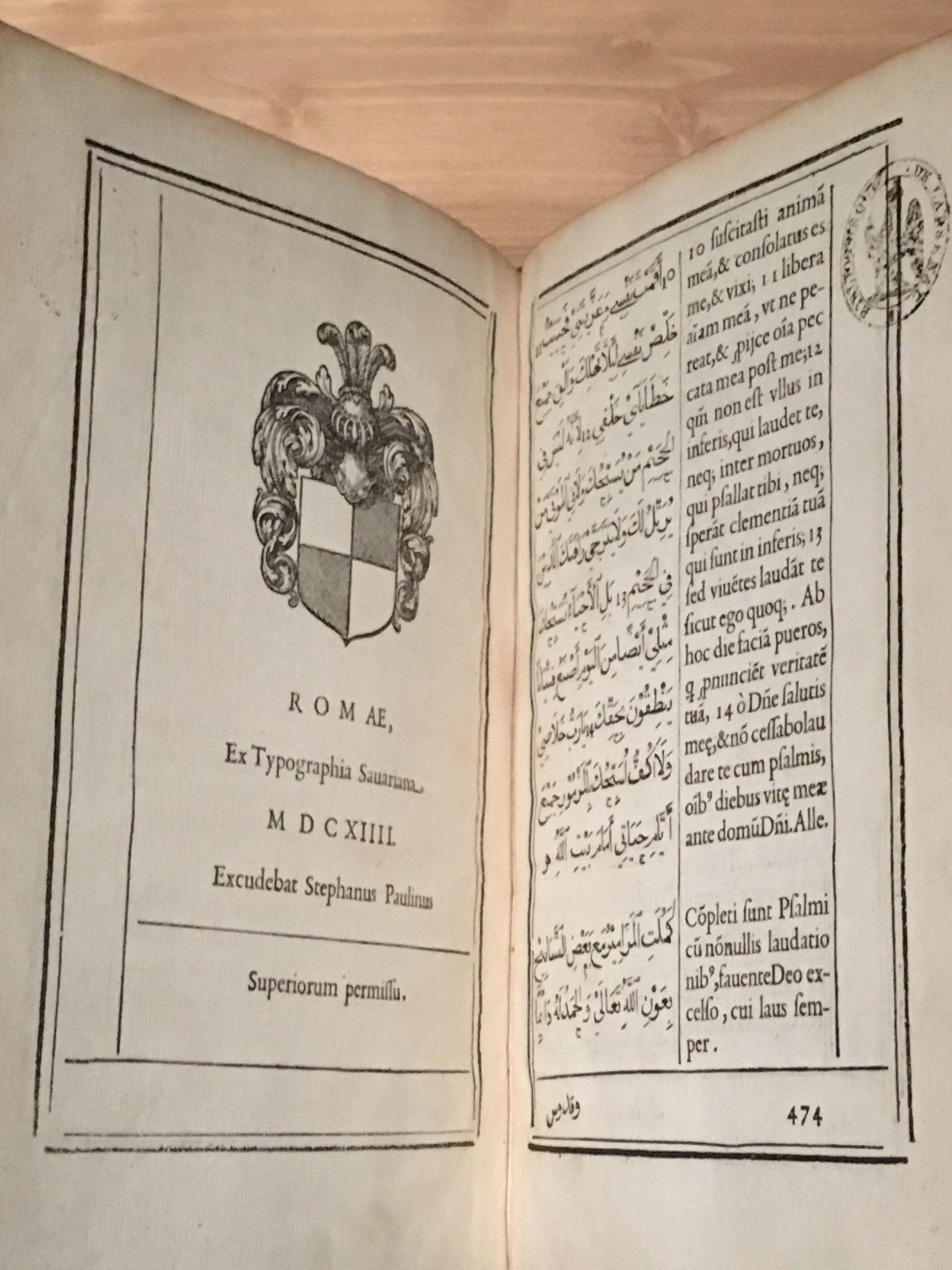 Liber psalmorum Davidis regis et prophetae, bilingue latin-arabe, traduction de Gabriel Sionite, Typographia Savarina, 1614. Bibliothèque de l'Arsenal 4-T-103.